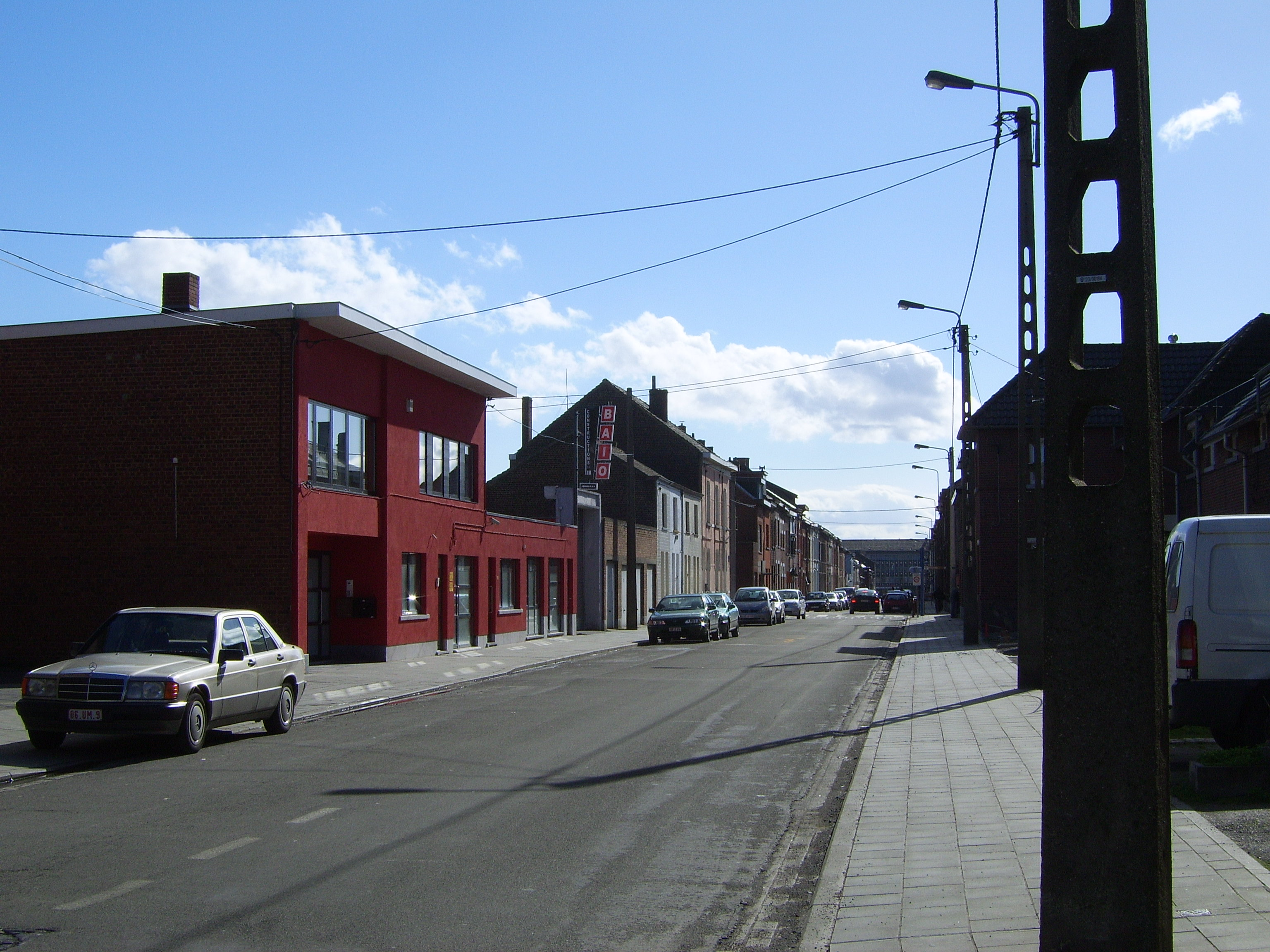 eigen werk Ruben Alexander